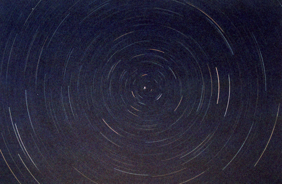 Circumpolaire (Argentique, 200Iso, f/11, 2H de pose)